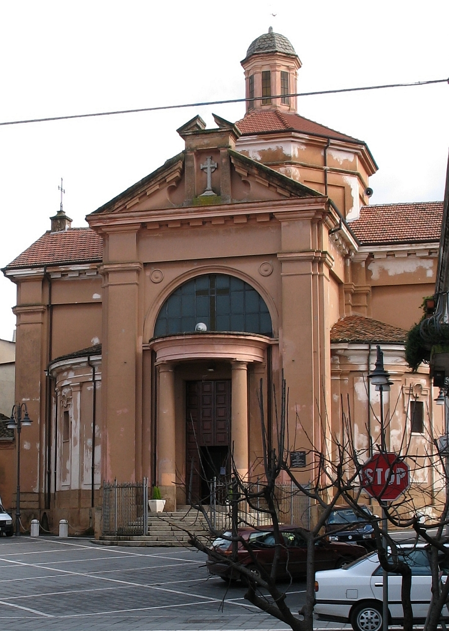 La Chiesa Madre in piazza del Popolo